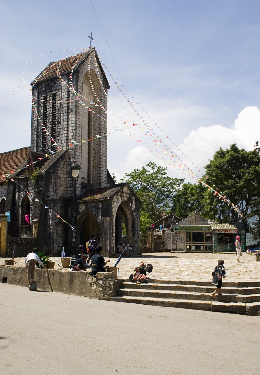 Church in Sapa, Vietnam.